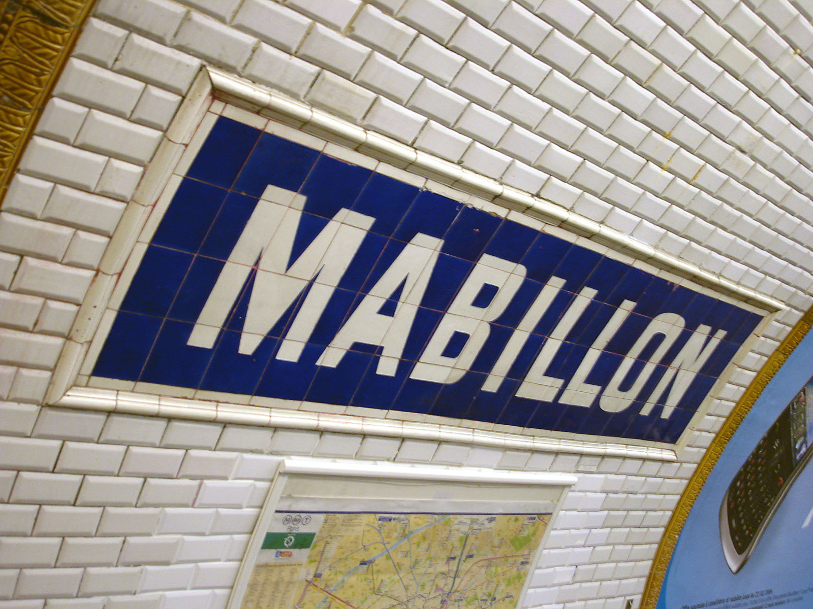 Panneau de la station Mabillon, de la ligne 10 du métro de Paris, France.